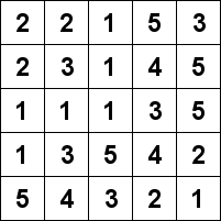 Egen teckning